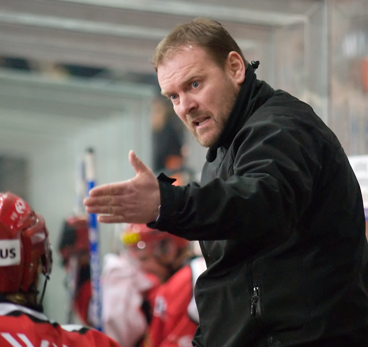 Heinz Ehlers Trainer EHC Biel-Bienne